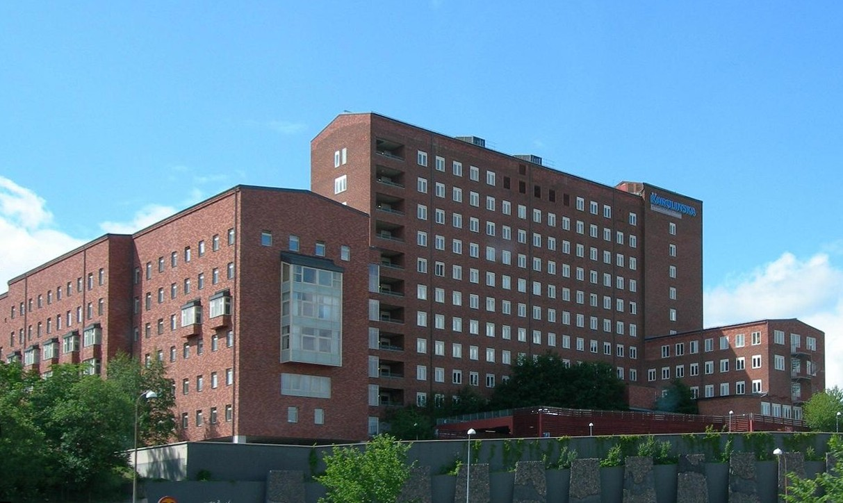 Karolinska Solna - Hospital in Stockholm, 2006.